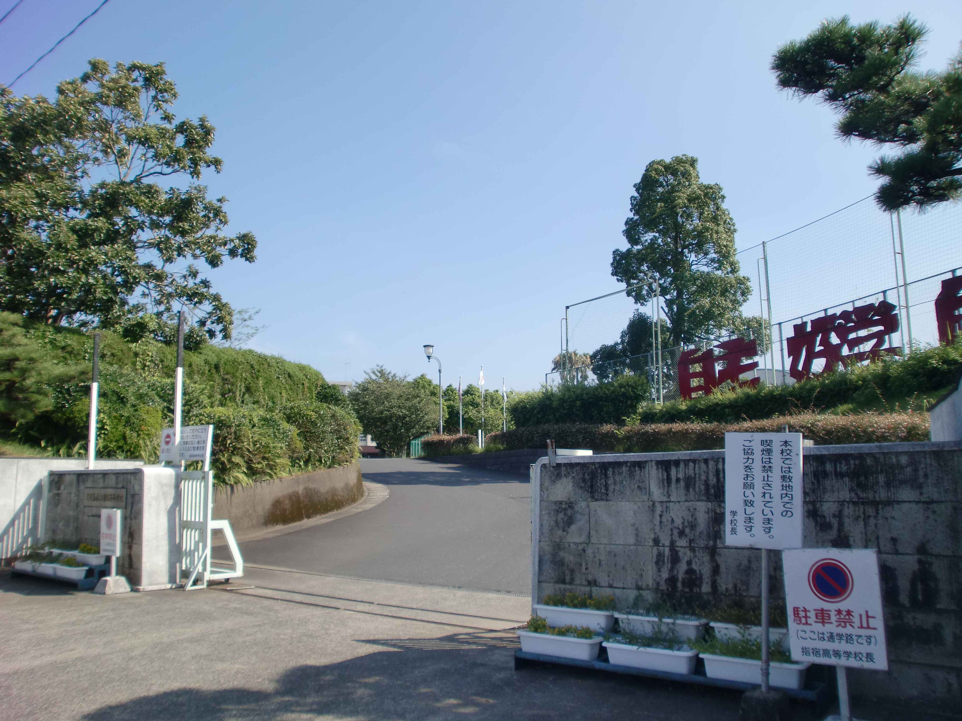 鹿児島県立指宿高等学校の校門。